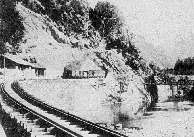 鳳来峡琵琶淵を走る鳳来寺鉄道（大正末期）